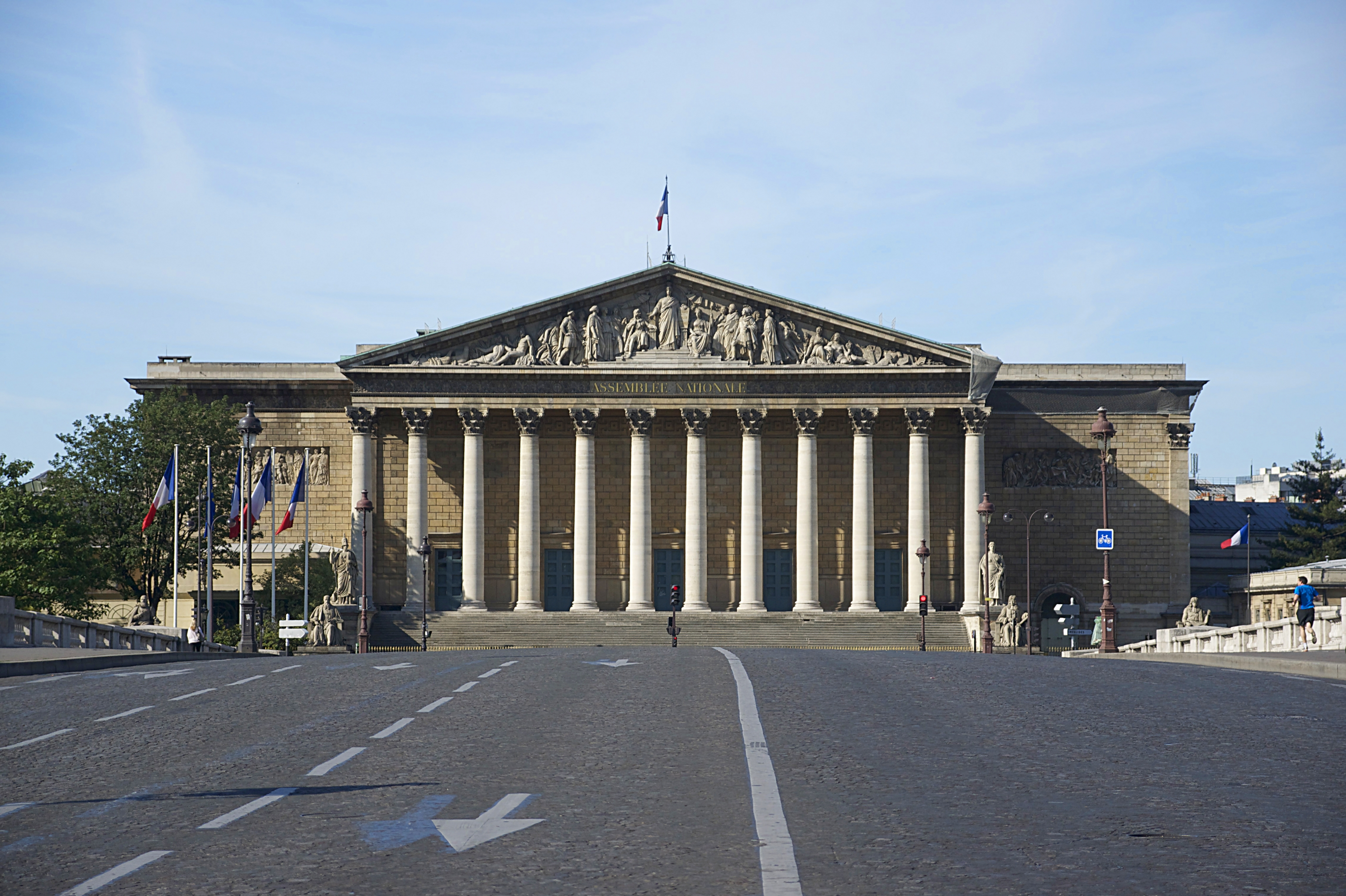 La façade de l'Assemblée Nationale, prise du pont de la Concorde à Paris, sans voitures !